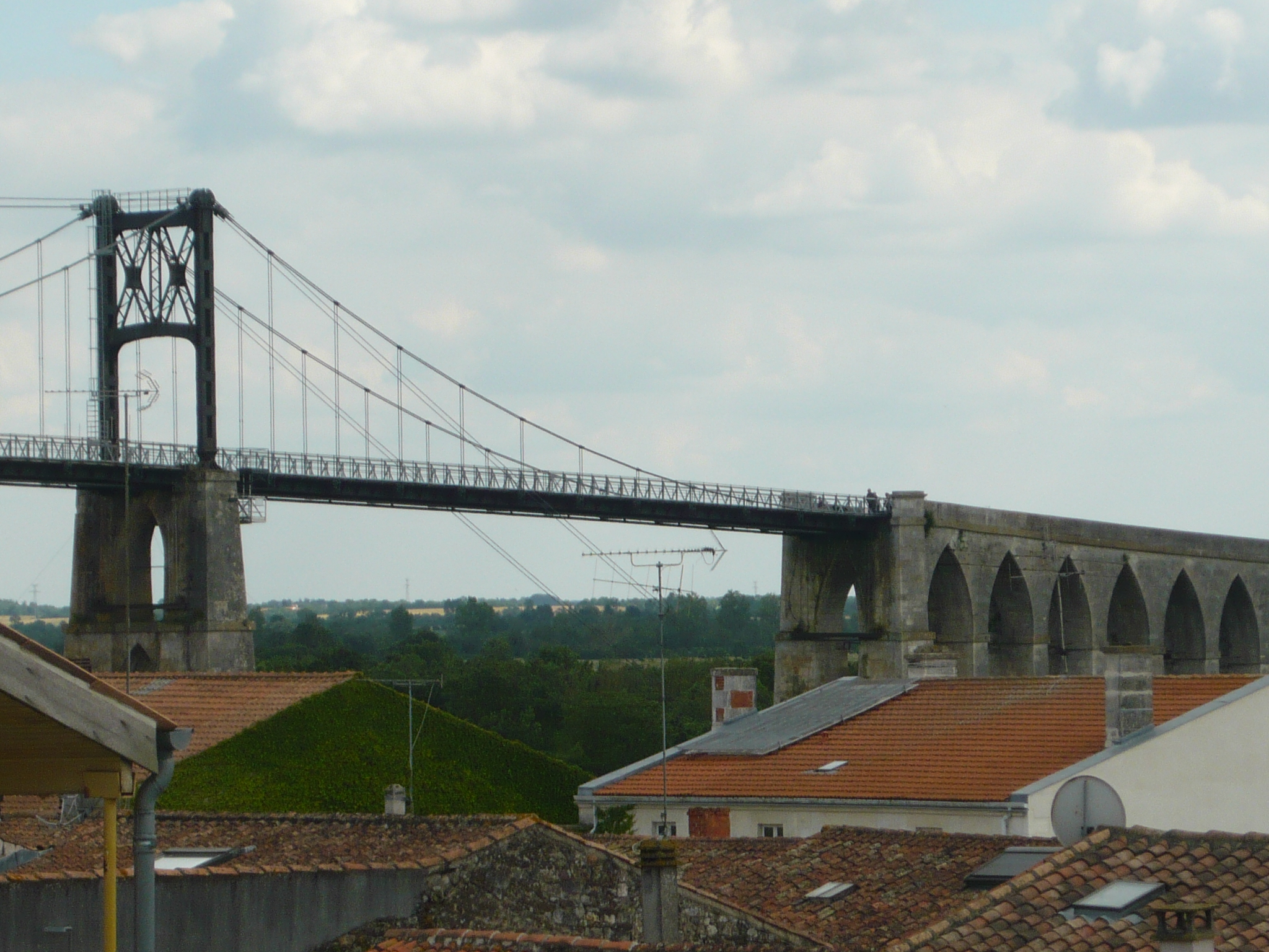 Le pont suspendu et les arcades du pont, au-dessus des toits de la ville de Tonnay-Charente